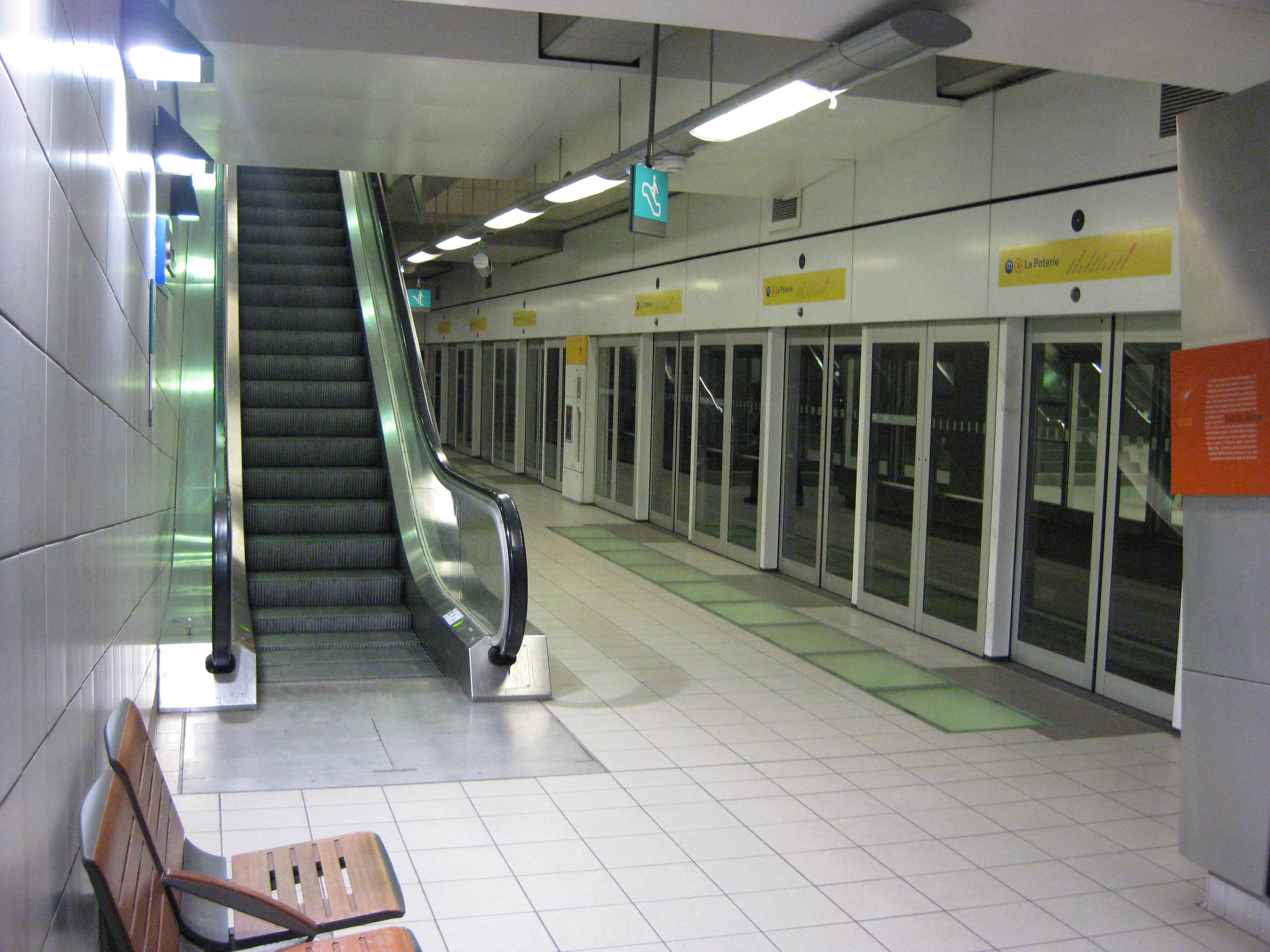 Quai de la station Sainte-Anne de Rennes direction la Poterie